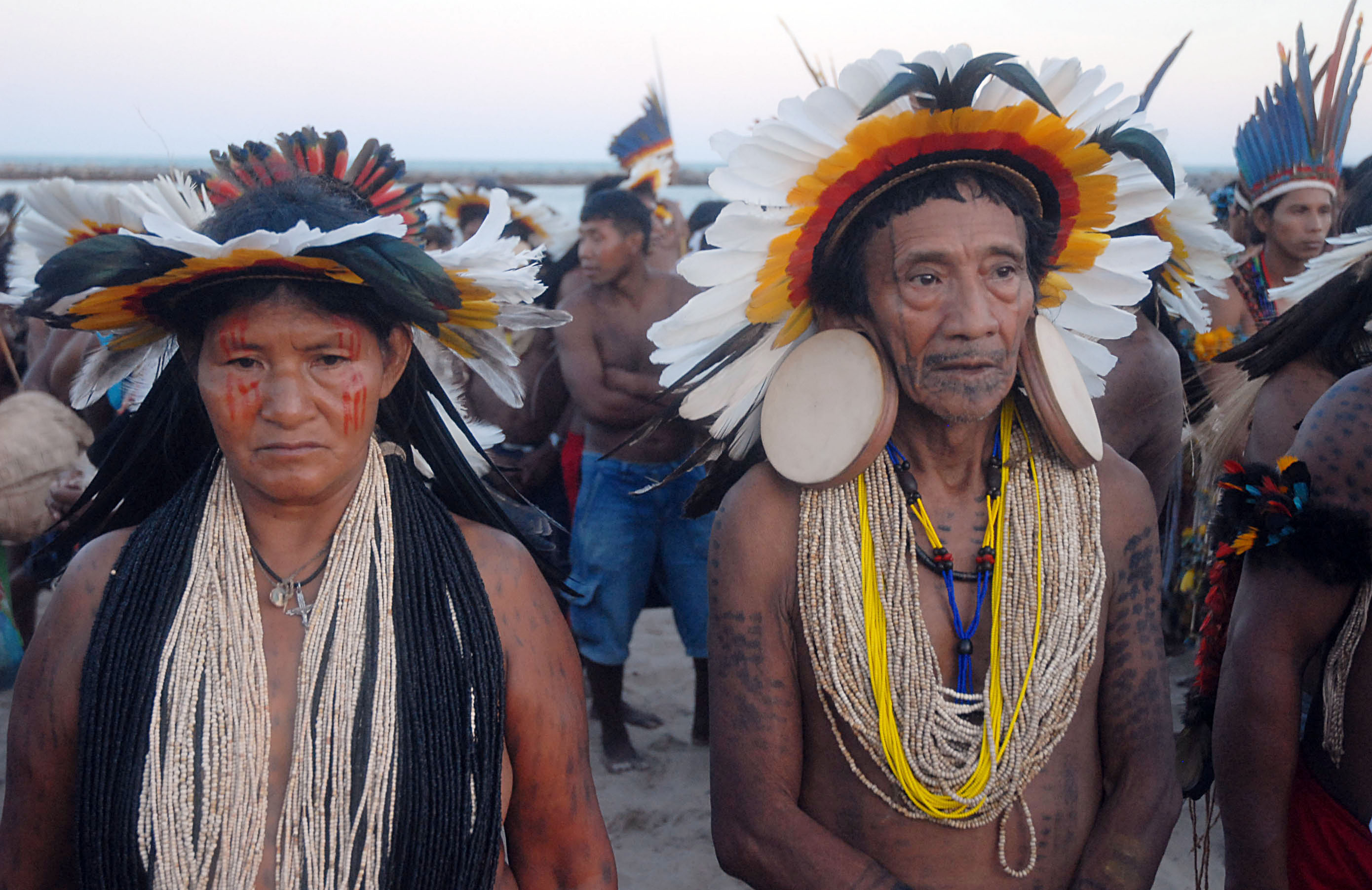 Índios da etnia da Rikbaksta na cerimônia de encerramento da nona edição dos Jogos dos Povos Indígenas (Olinda PE)